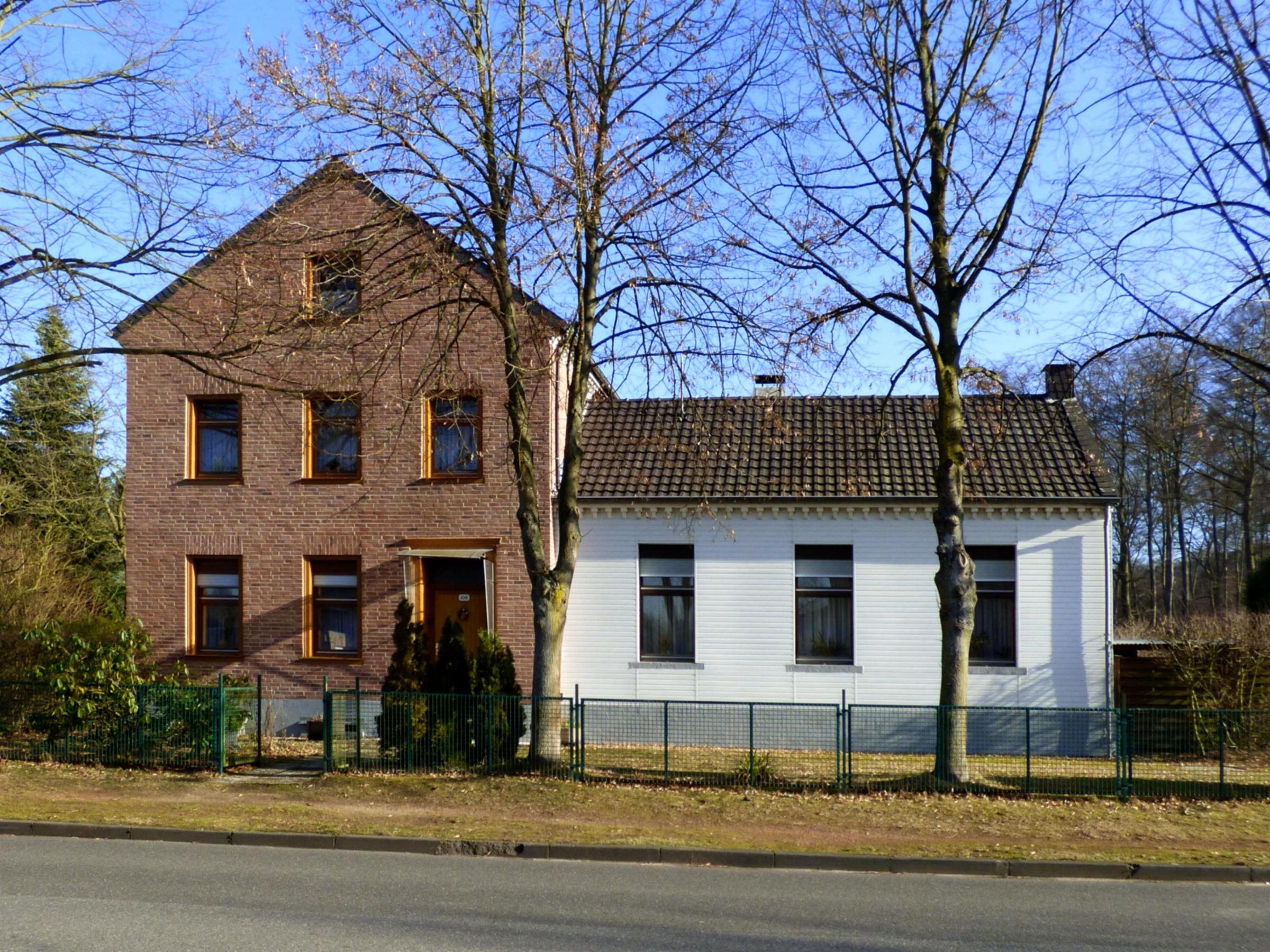 Ehem. Schule in Beeckerheide